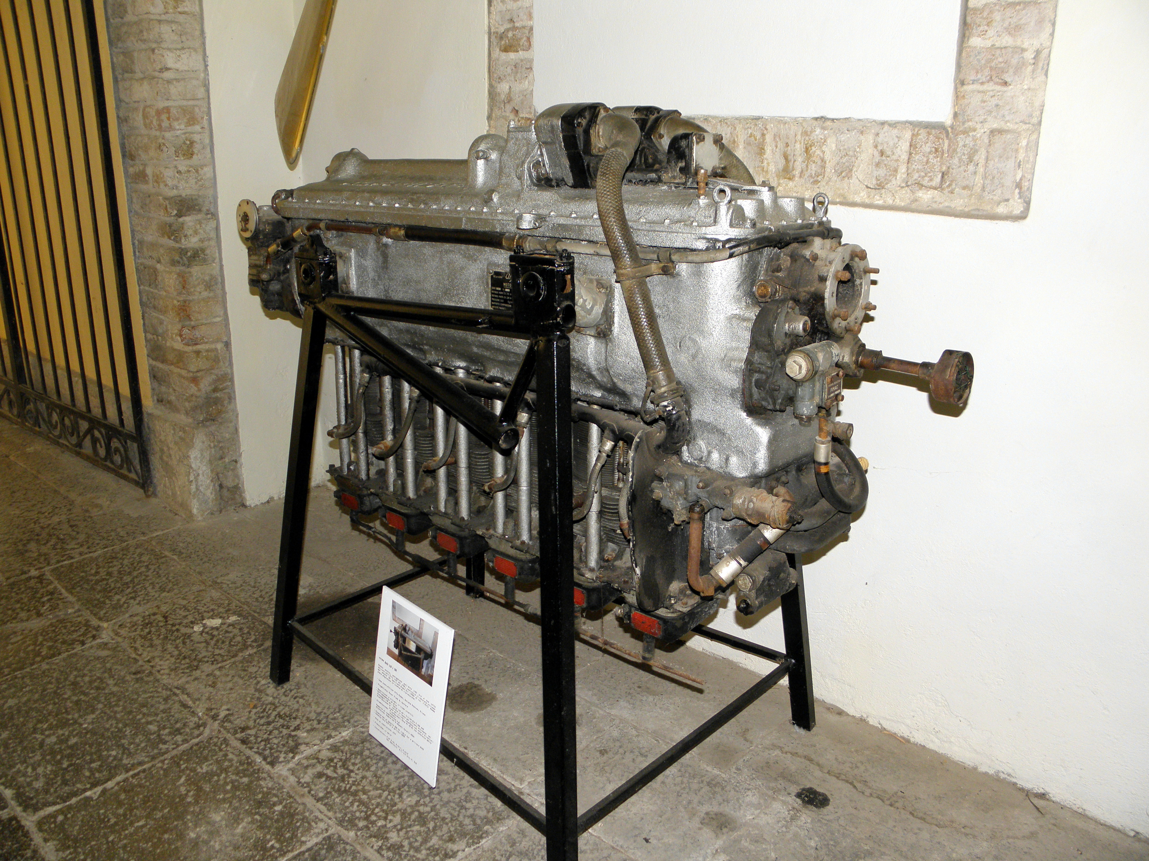 San Pelagio, frazione di Due carrare: Museo dell'aria, il motore aeronautico Alfa Romeo 115ter in esposizione al museo.